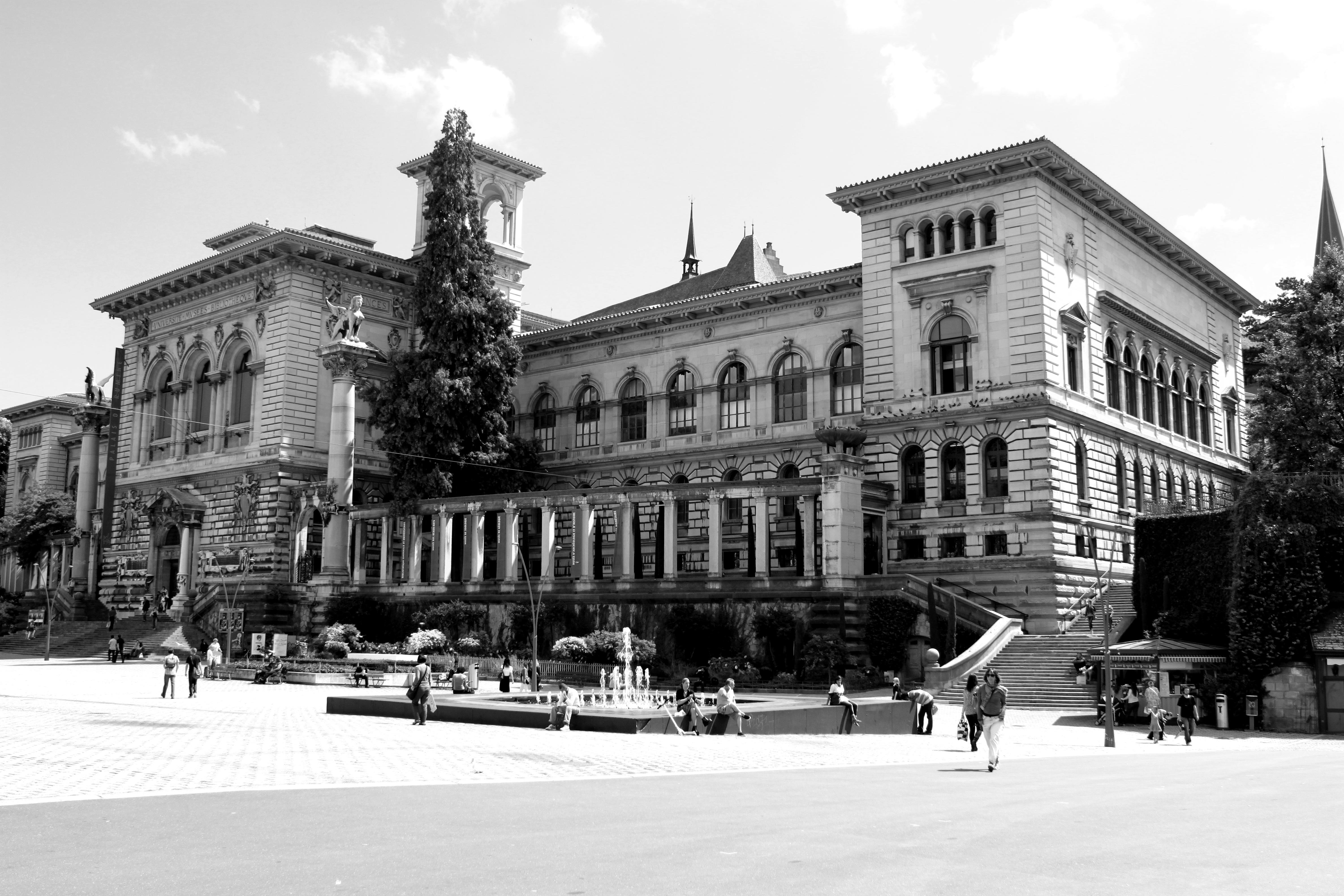 Lausanne, Palais de Rumine et Musée cantonal de géologie, vue depuis la place de la Riponne.